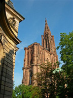 Cathédrale de Strasbourg